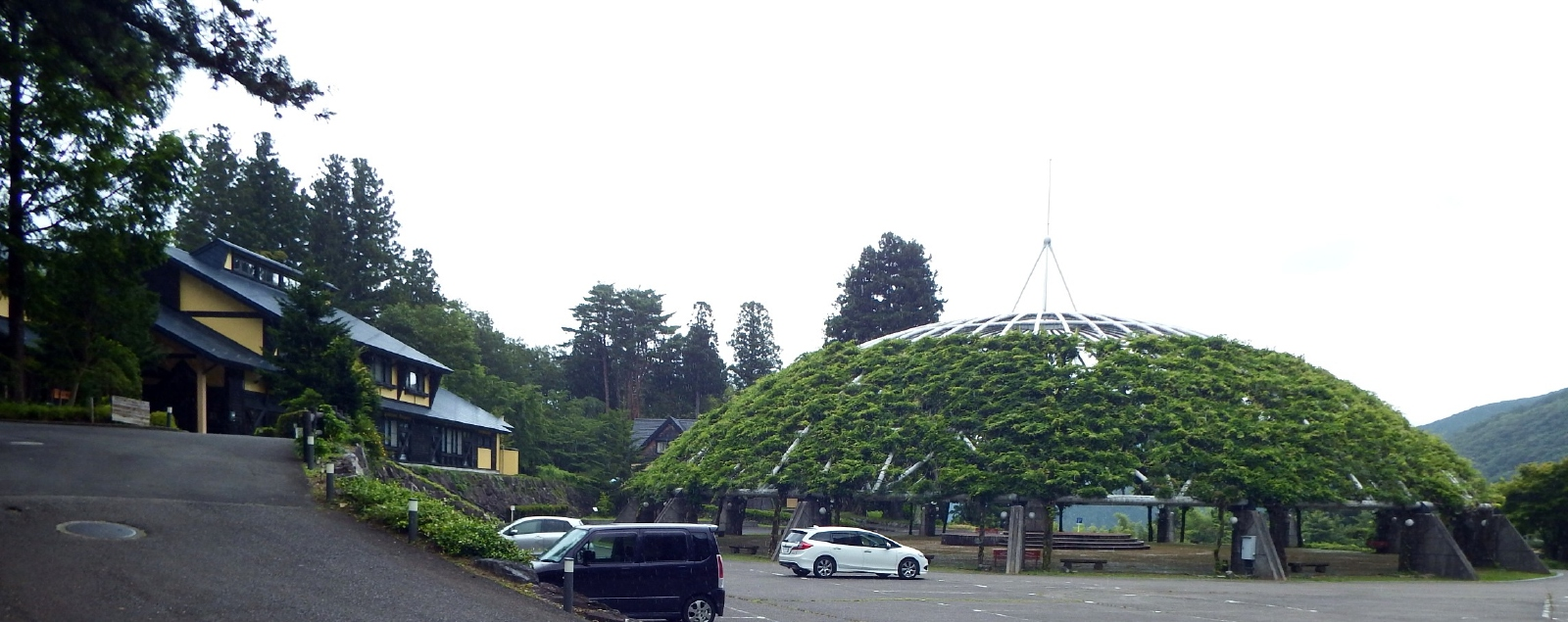 ゆらぎの森、レストランと藤棚